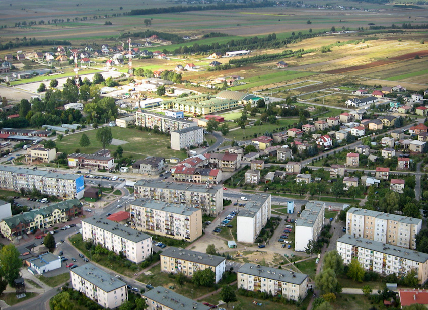 Działoszyn - Widok z lotu ptaka